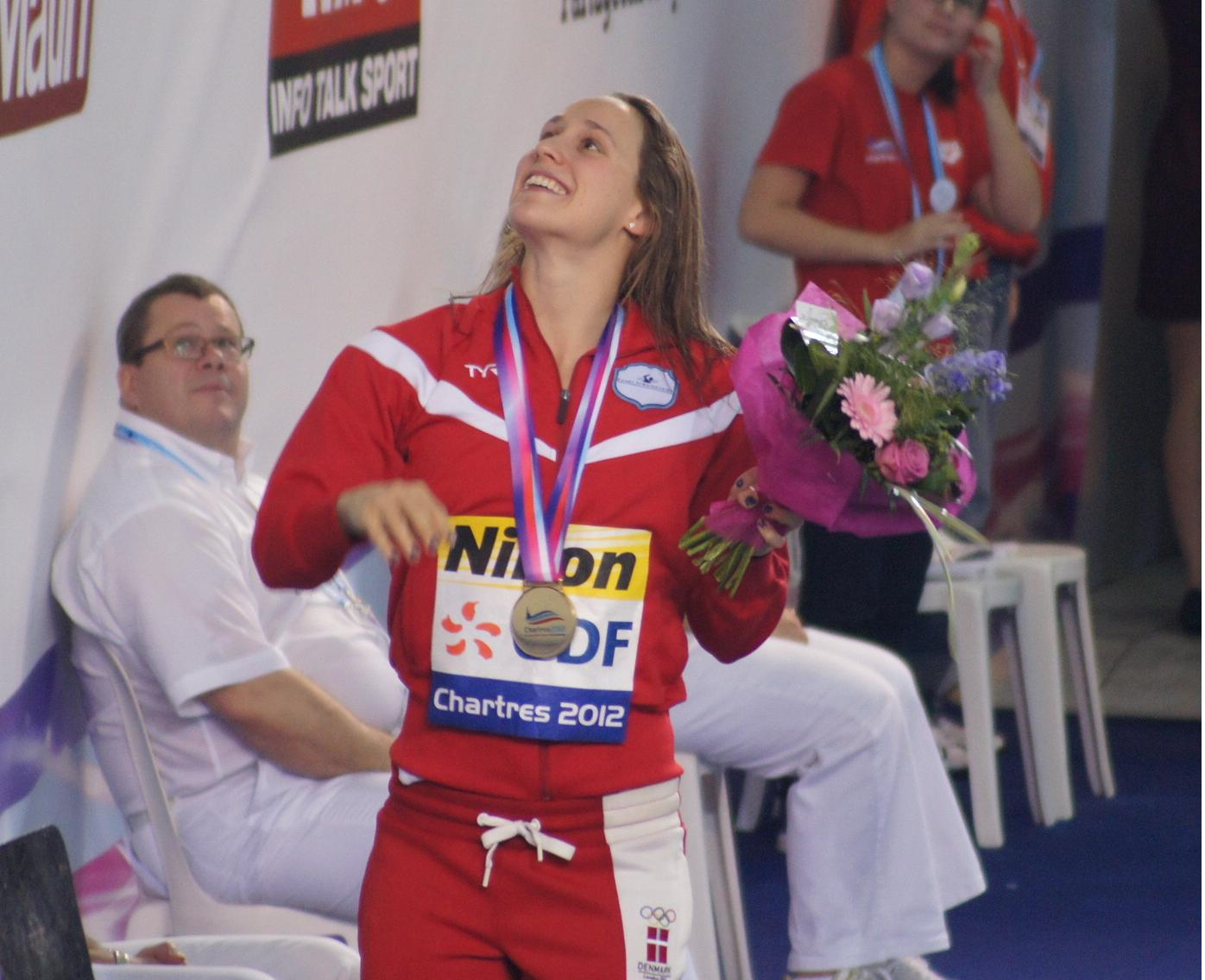 Championnats d'Europe de natation en petit bassin, Chartres 2012